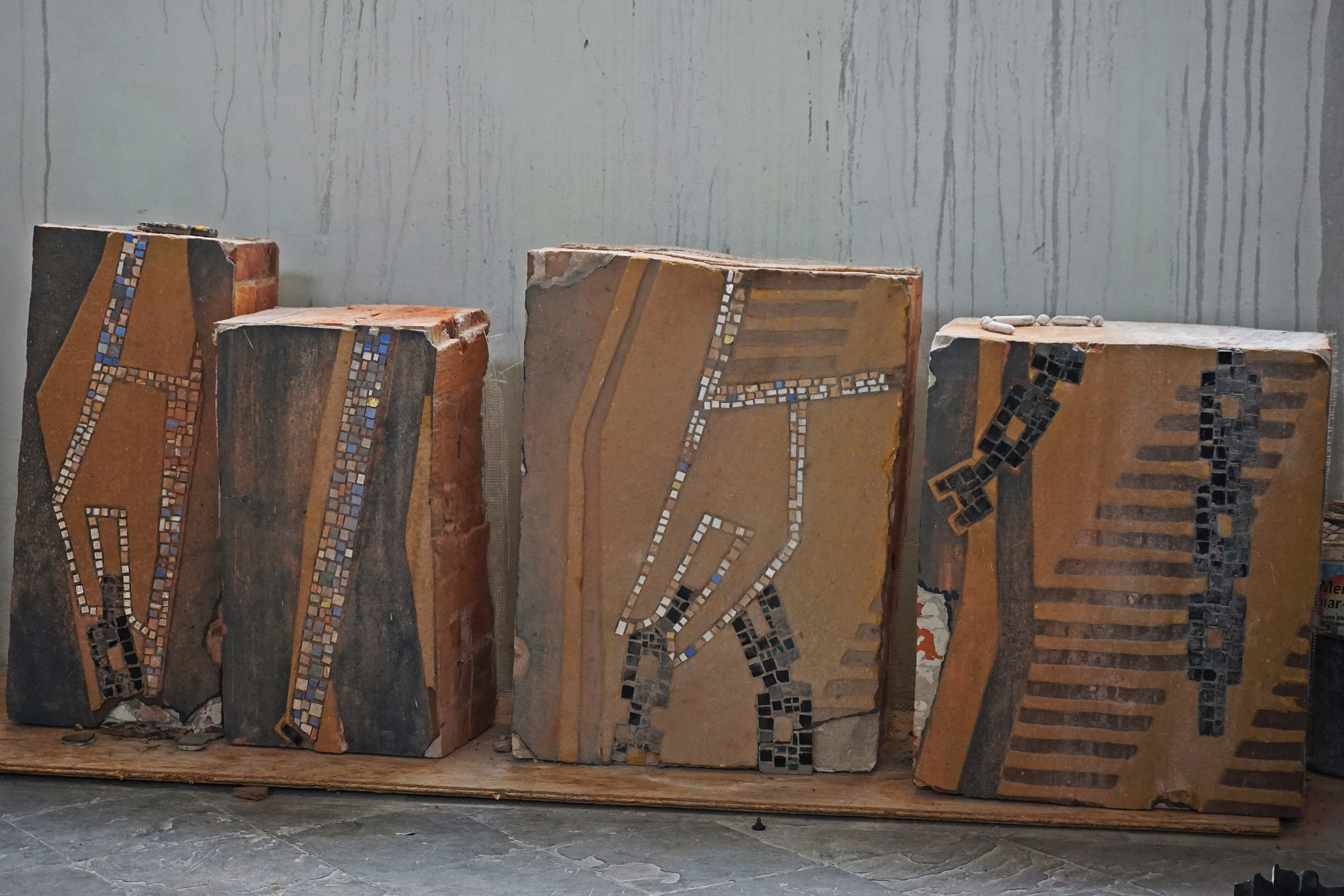 Günter Johl, "Durchbrecher aller Bande", Sgraffito für die Sankt-Nicolai-Kirche in Magdeburg, 1954. Die Abbildung zeigt den Zustand des Kunstwerks von 2016 nach dem Schwammbefall.